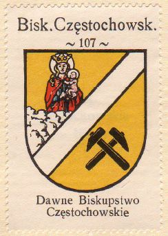 Herb Biskupstwa Częstochowskiego - Hag